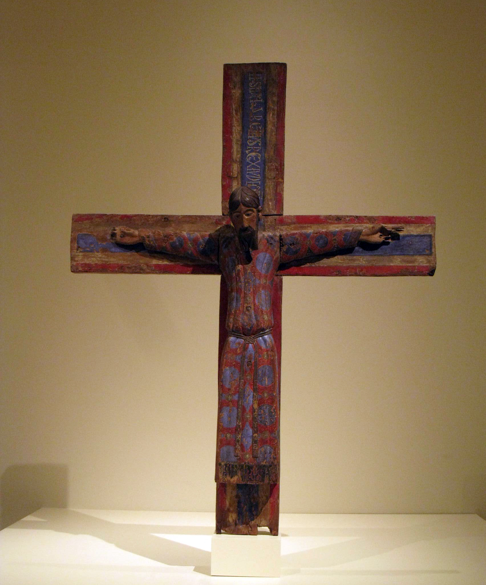 Palau Nacional (Barcelona)